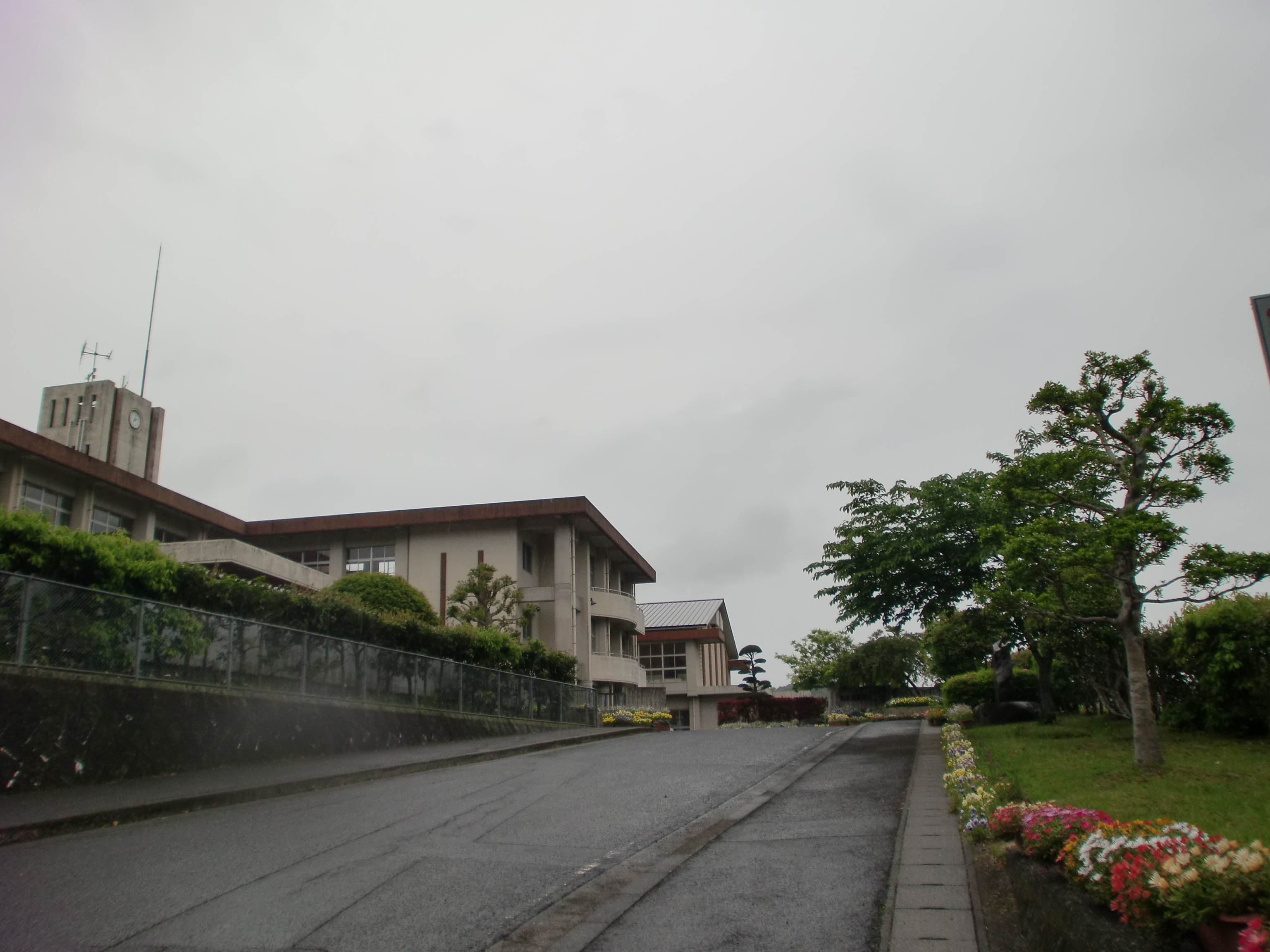 薩摩川内市立平成中学校の外観。